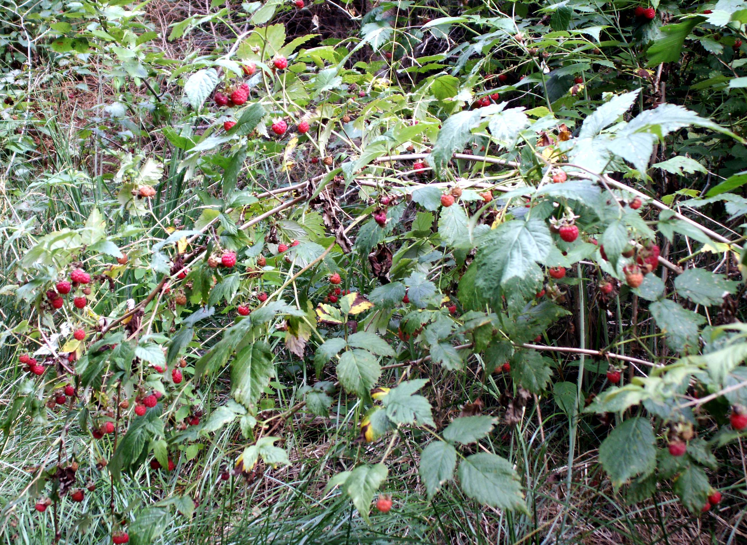 Paprastoji avietė (Rubus idaeus)